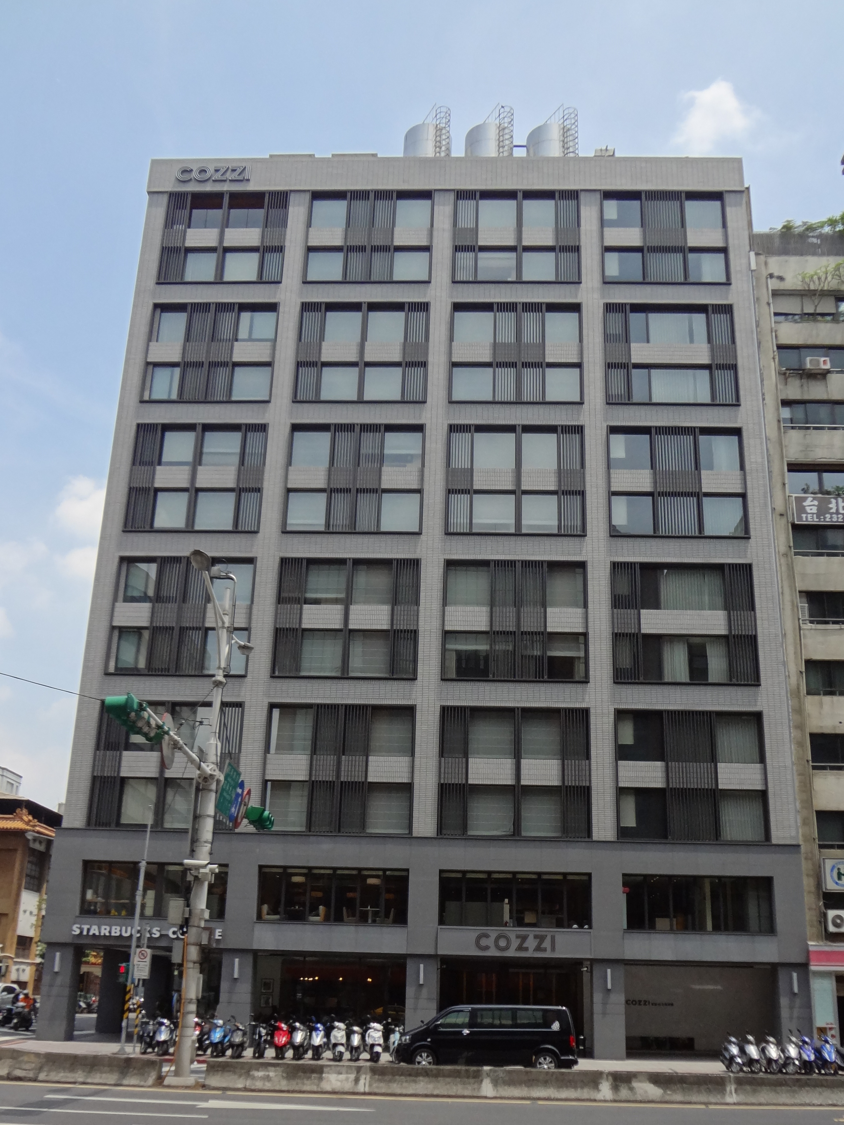 中文（台灣）: 國泰商旅和逸台北忠孝館，地址：臺北市中正區忠孝東路一段31號。